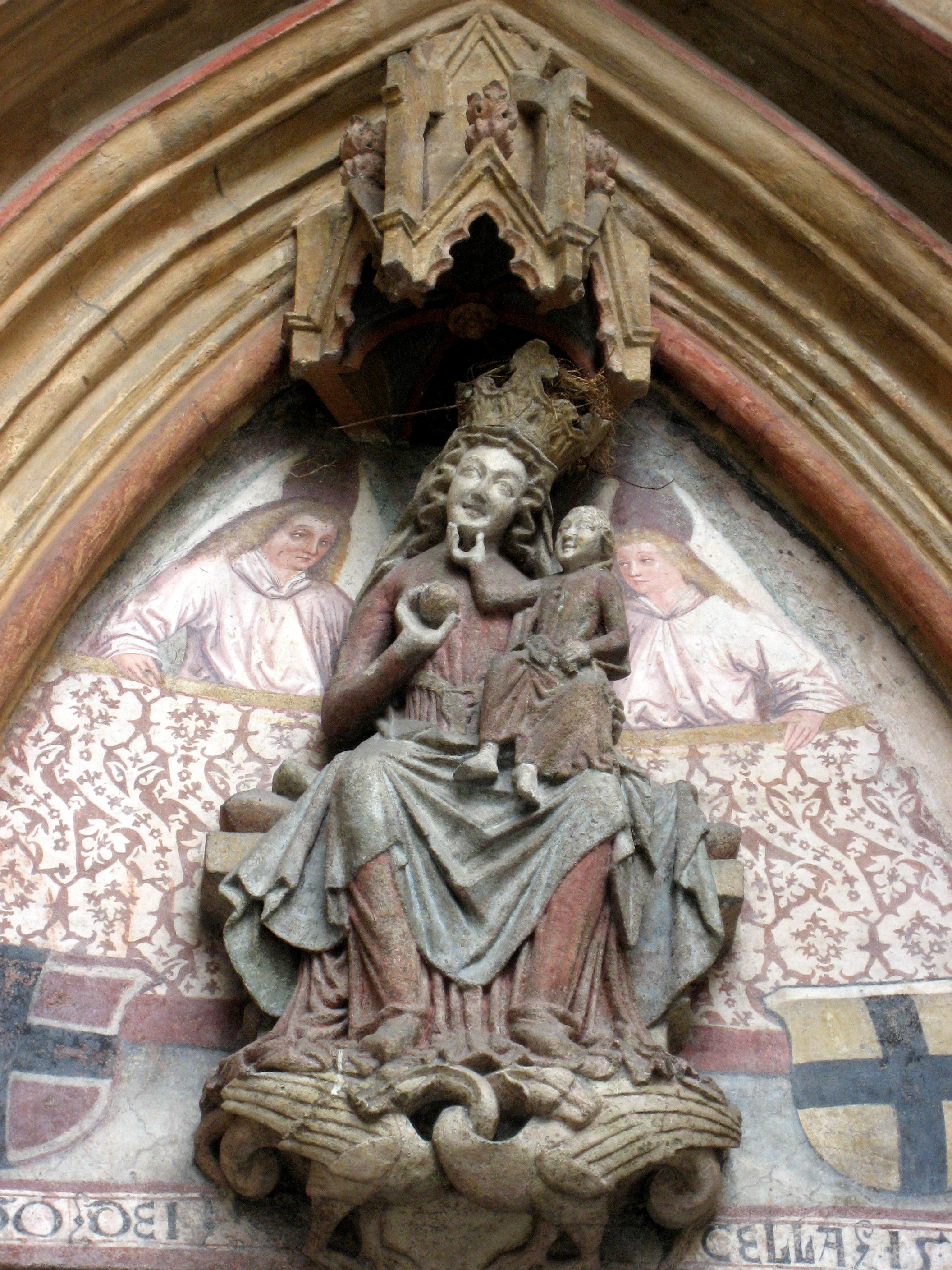 Leechkirche in Graz, älteste erhaltene Kirche der Stadt Graz; Madonnenfigur im Tympanon (Leechkirche in Graz, Austria)